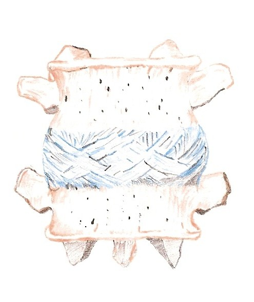 Visión anterior del disco intervertebral a nivel lumbar: Las fibras externas del anillo fibroso se insertan directamente en el tejido óseo de ambas vértebras